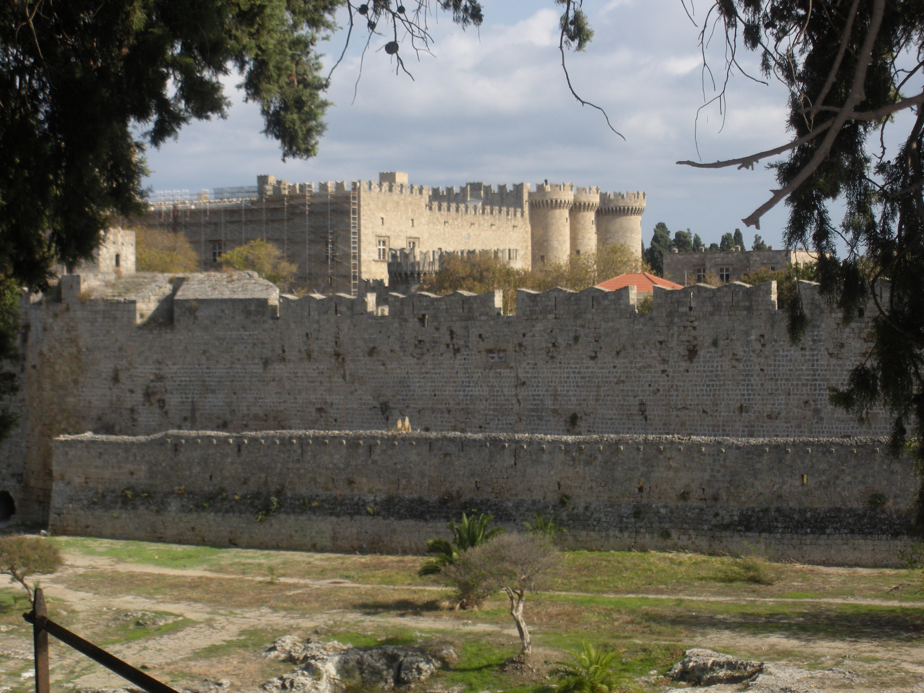 Άποψη της Παλιάς Πόλης της Ρόδου με θέα το Παλάτι του Μεγάλου Μαγίστρου